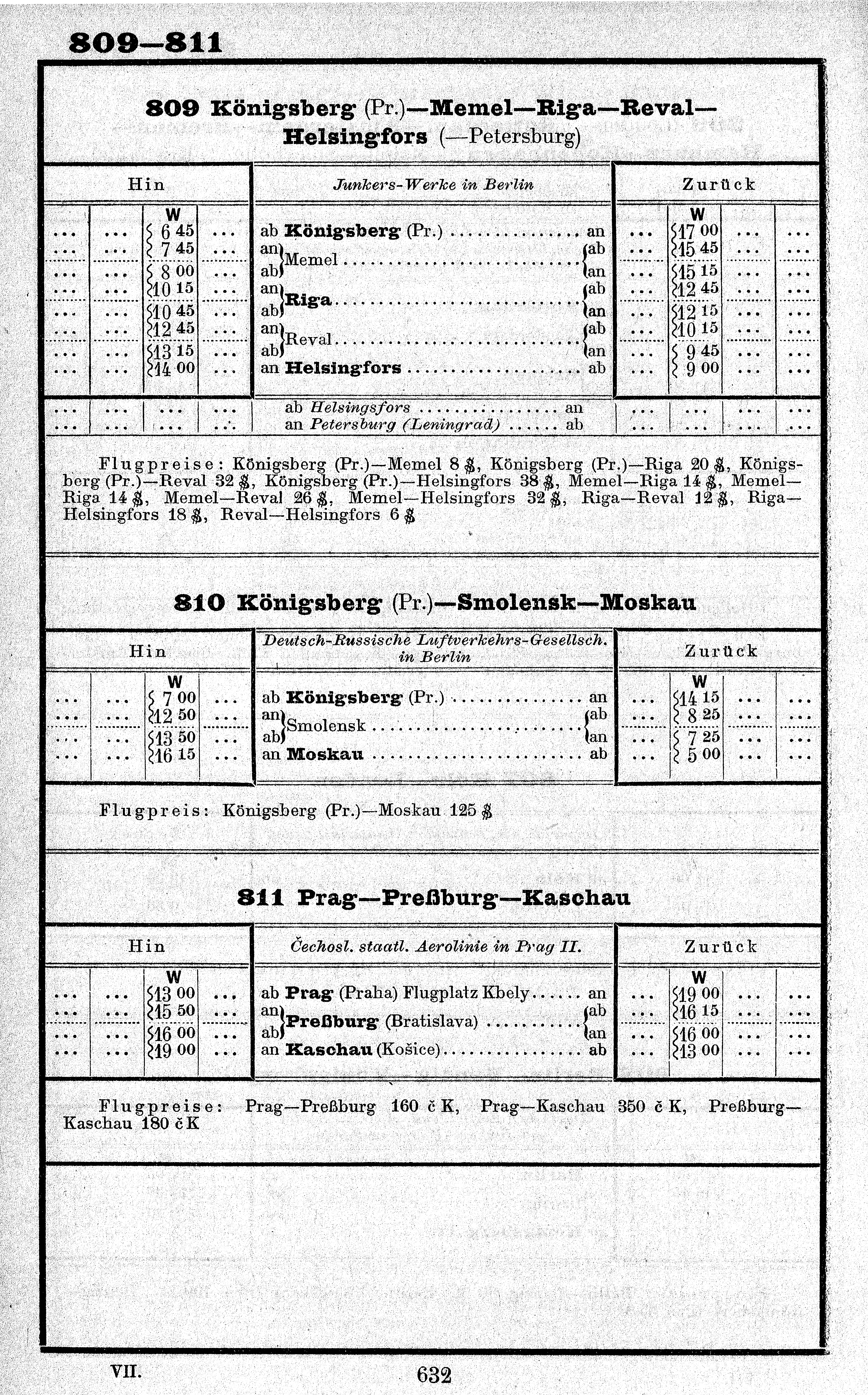 Flugpläne der Verbindungen in Königsberg, Memel, Riga, Reval (Talinn), Helsinki, Smolensk, Moskau, Prag, Preßburg, Kaschau